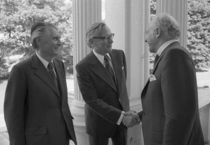 Bundespräsident Walter Scheel empfängt die Teilnehmer der Botschafterkonferenz aus osteuropäischen Staaten im Bundespräsidialamt. Information added by Wikimedia users. This file has an extracted image: File:Erwin Wickert thumb.jpg.